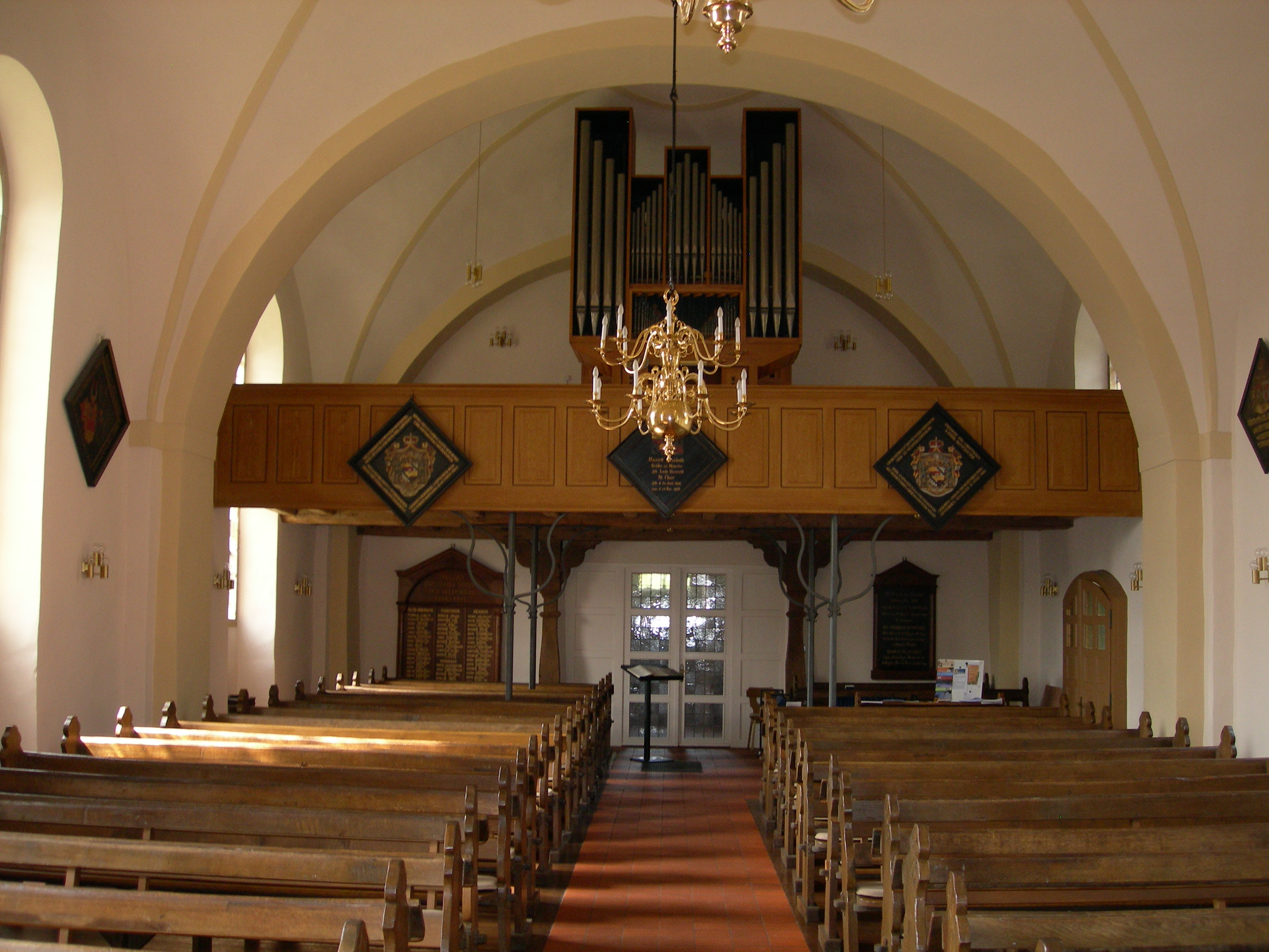 Urbankirche (Holte): Blick auf den Altar: Blick auf die Empore